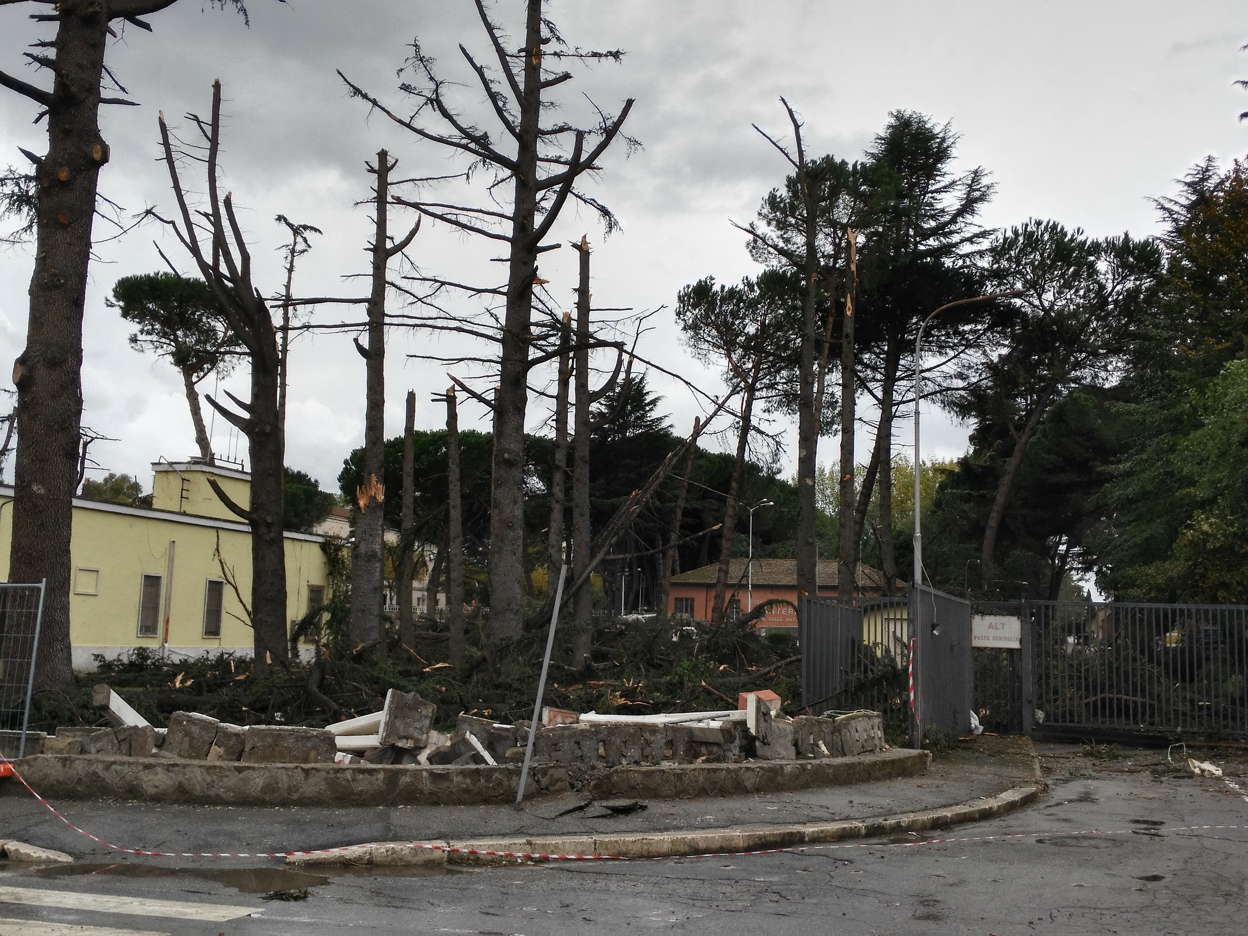 L'ingresso della Scuola di Fanteria subito dopo il passaggio del tornado del 6 novembre 2016